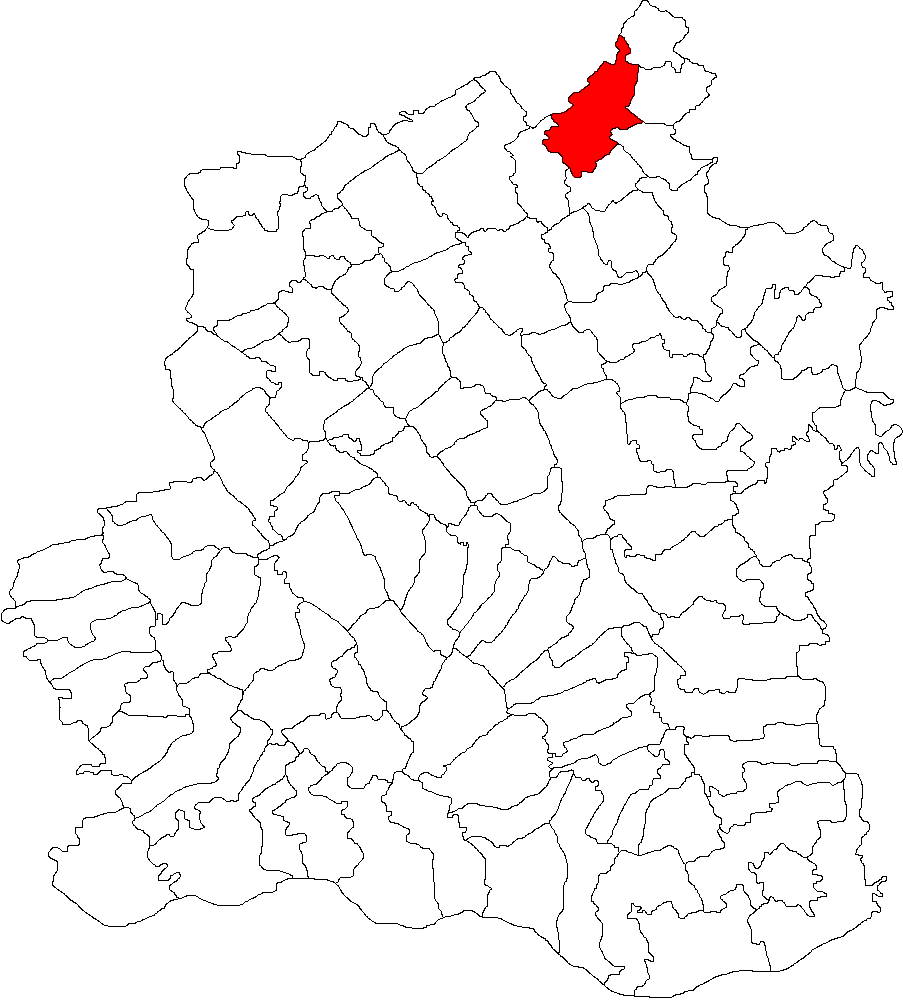 Categorie:Hărţi ale judeţului Teleorman